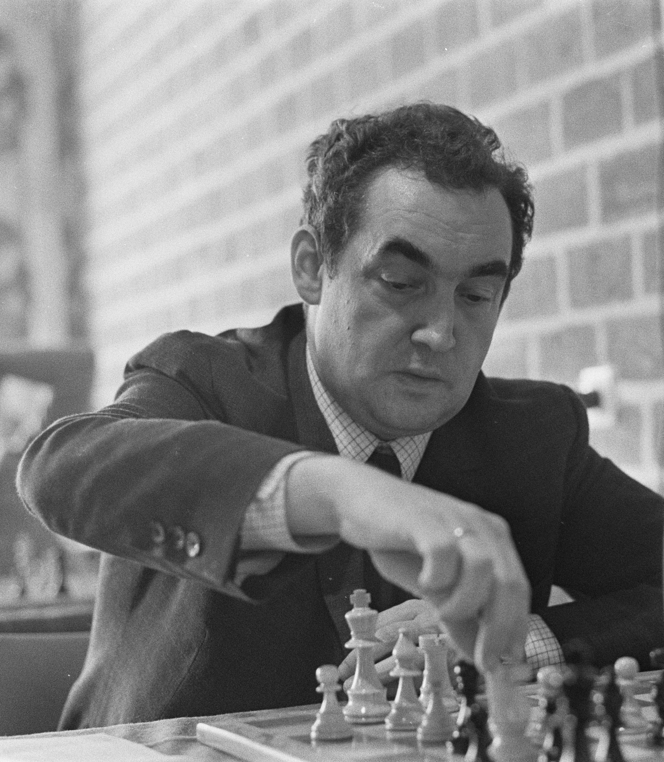 Hoogoven Schaaktoernooi Beverwijk. Mark Taimanov (SU) aan zet.